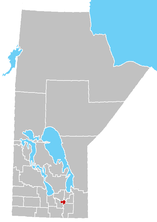 Manitoba census area No. 11